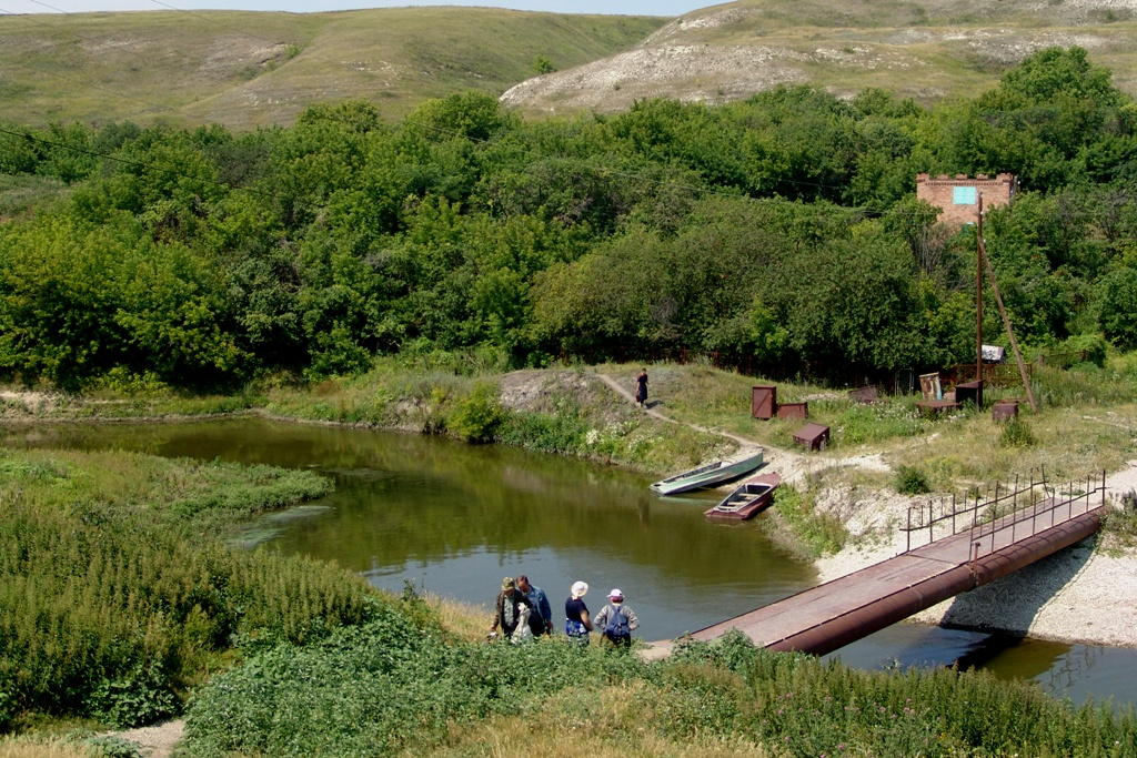 Новодевичье. Мостик в Завражный поселок